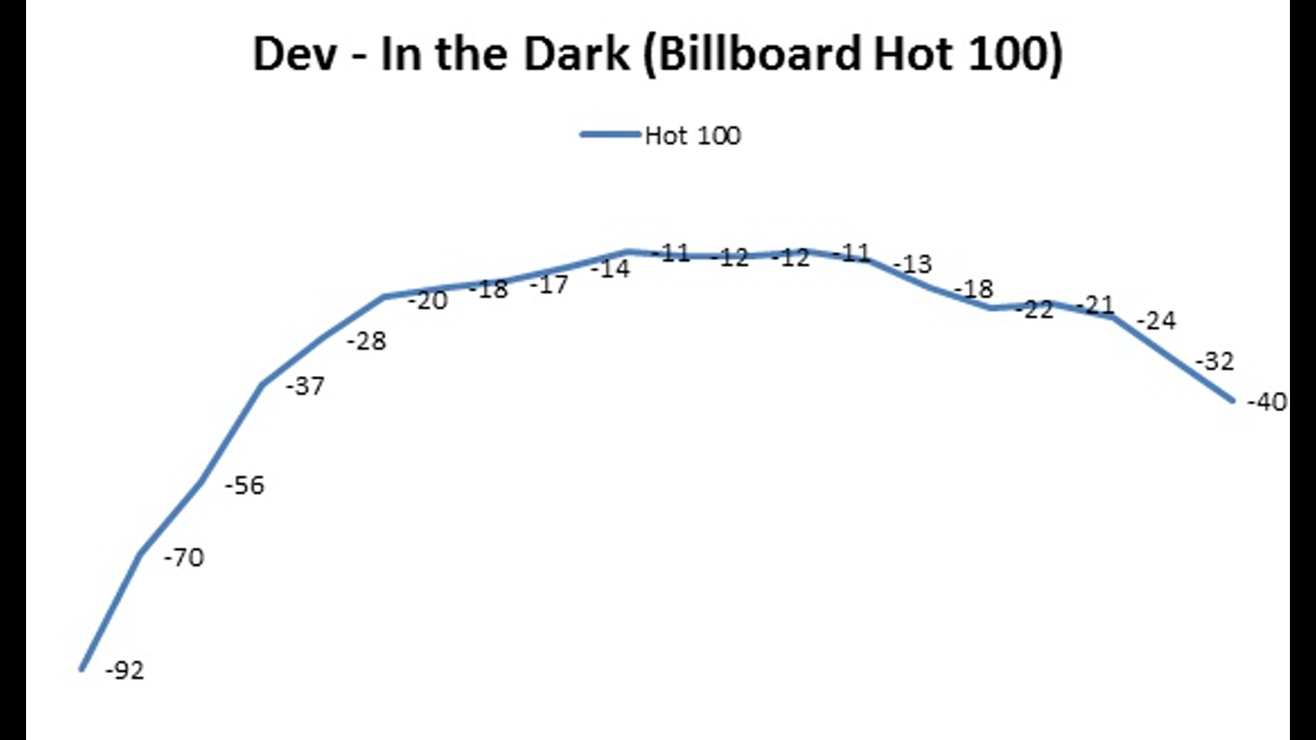 Gráfico mostrando a trajetória da canção "In the Dark" da Dev, na parada americana da Billboard Hot 100.